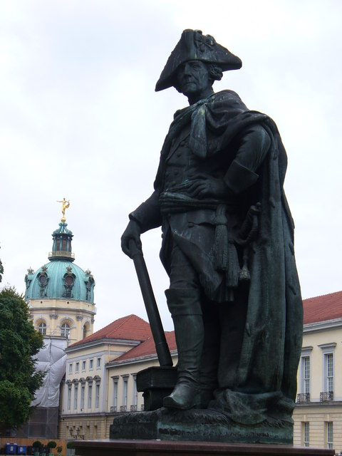 Friedrich der Gross, Berlin/Germany